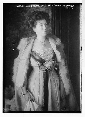 Maria Matilda Ogilvie Gordon Vizepräsidentin des International Council of Women